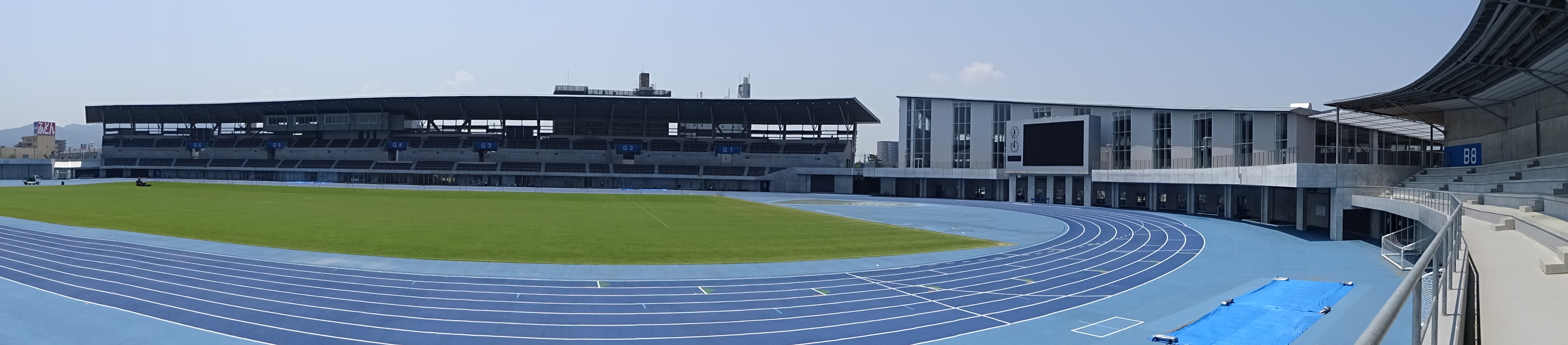 メインスタンドを臨む（１）、七月、ワイド画像